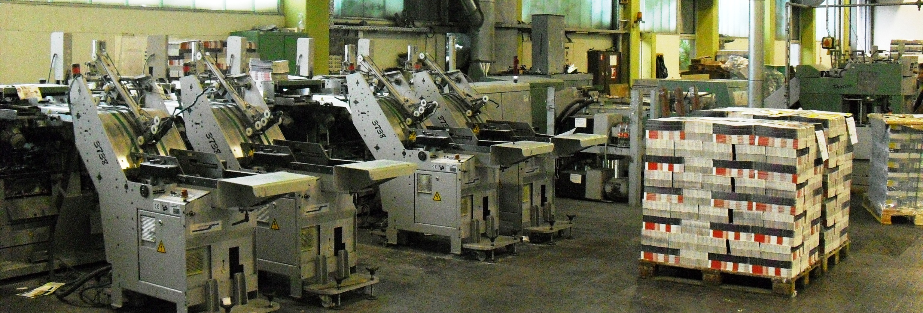 Sammelhefter, Buchbindereimaschine